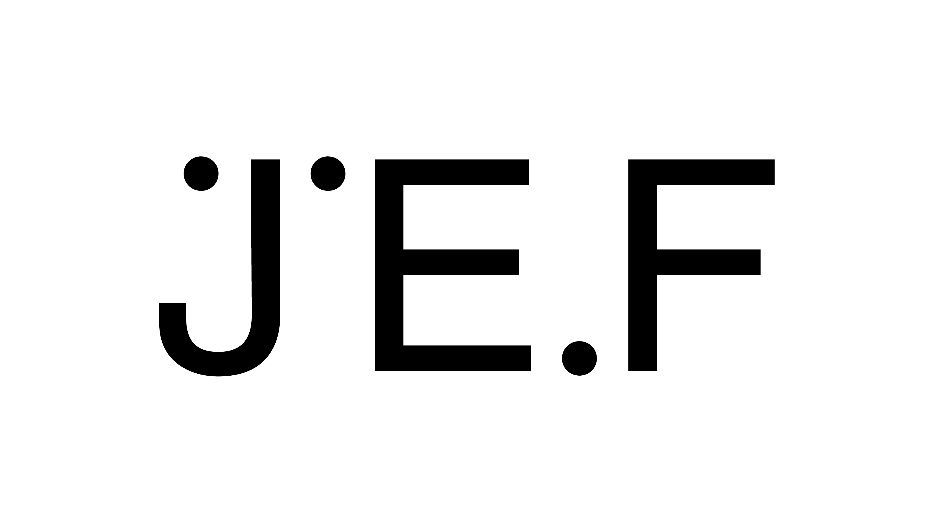 JEF Jeugdfilm